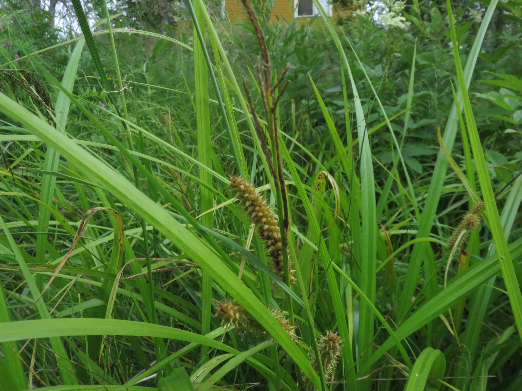 Kaislasara, Suomi